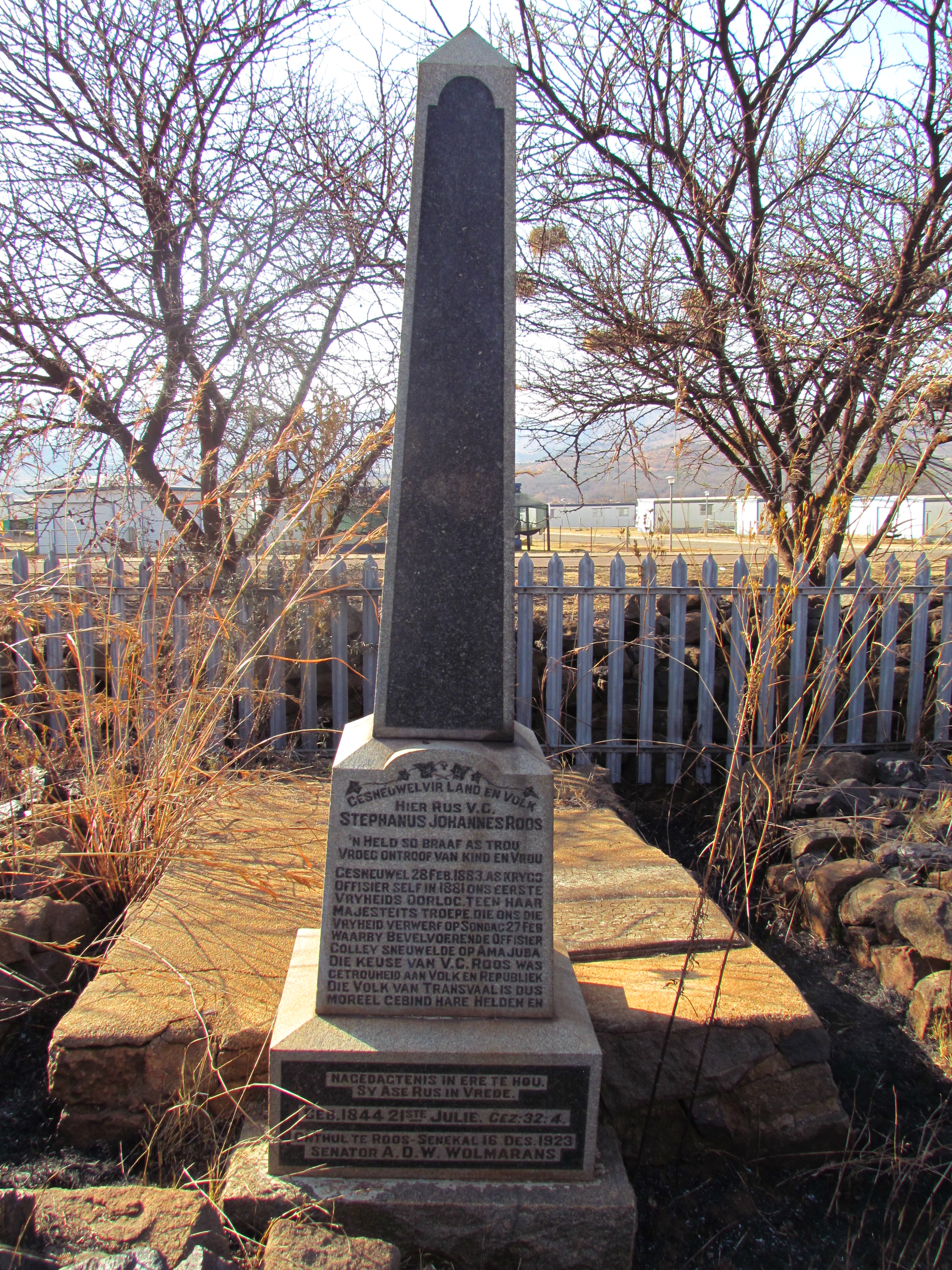 Graf van Stephanus Johannes Roos, een van die naamgewers van Roossenekal